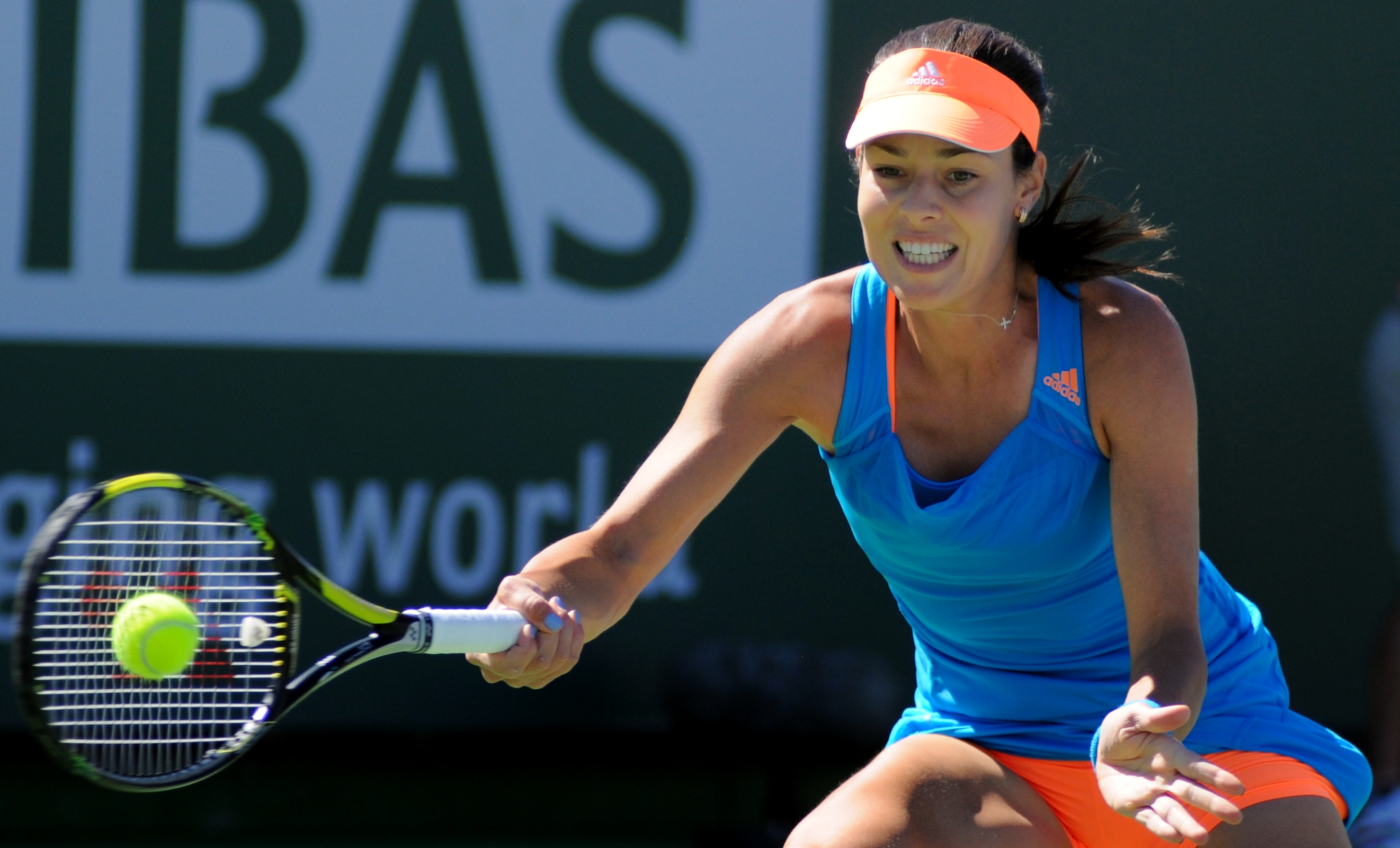 2014 BNP Paribas Open